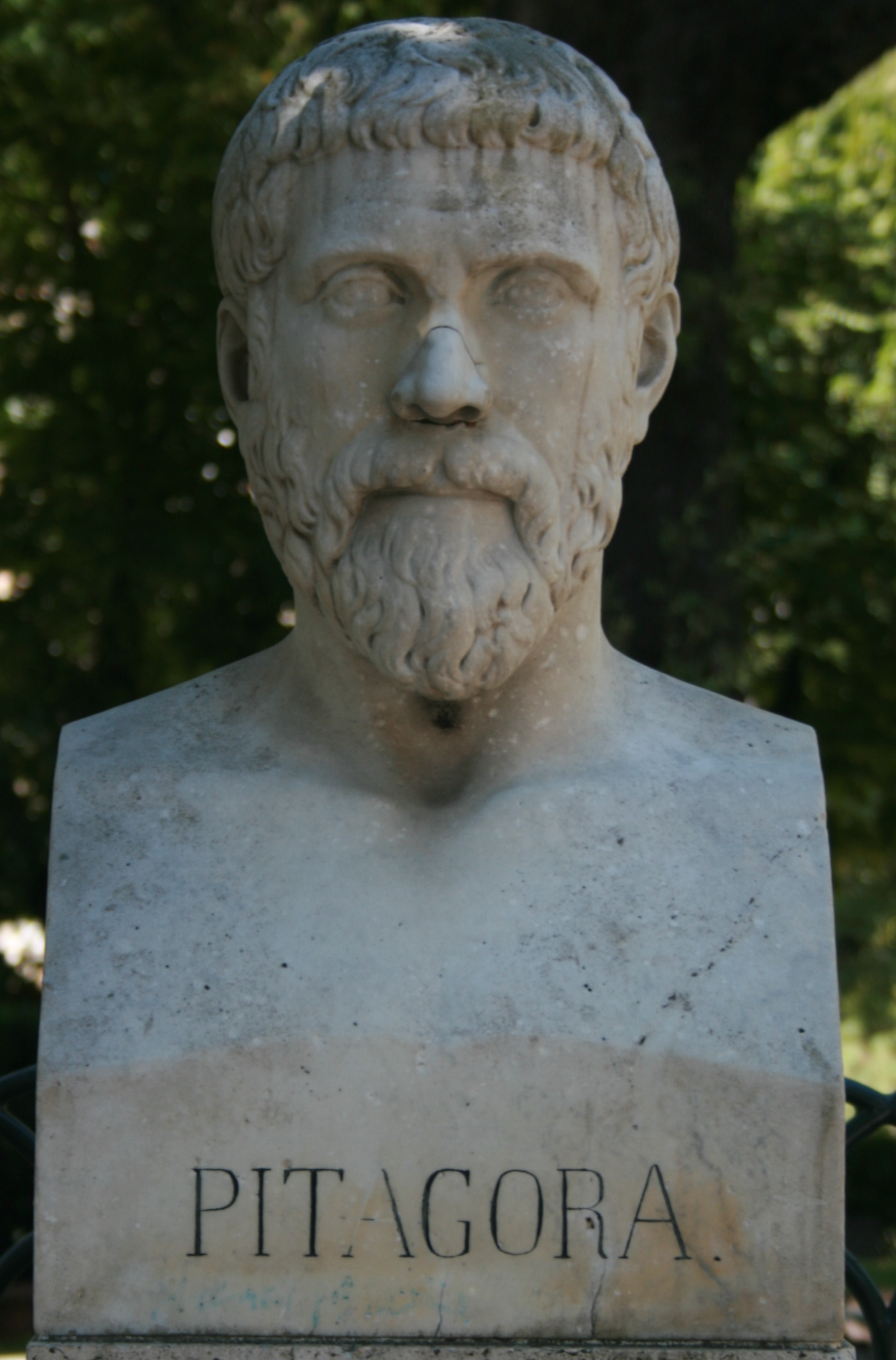 Buste de Pythagore, jardins de la Villa Borghese à Rome.